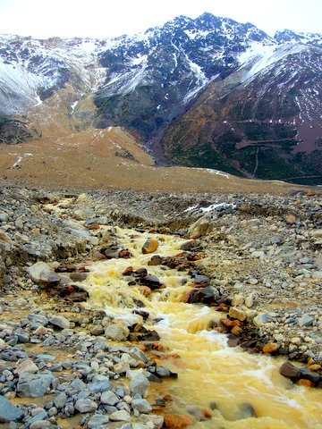 Cajón del Maipo superior, al oriente de Santiago, Chile.Cajón del Maipo